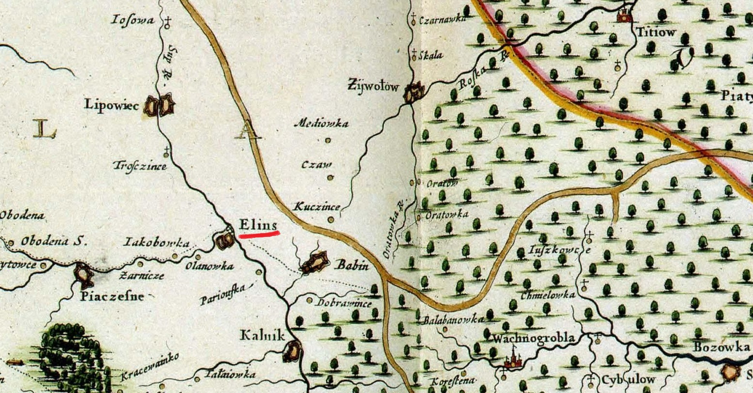 Карта Гійома Боплана де Іллінці вказано як Elins